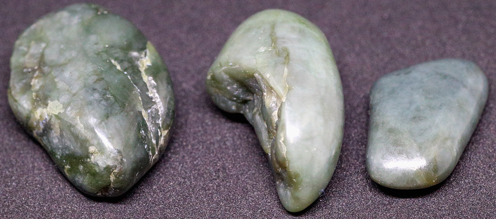 新潟県糸魚川市で採取された軟玉（鑑定：フォッサマグナミュージアム学芸員）